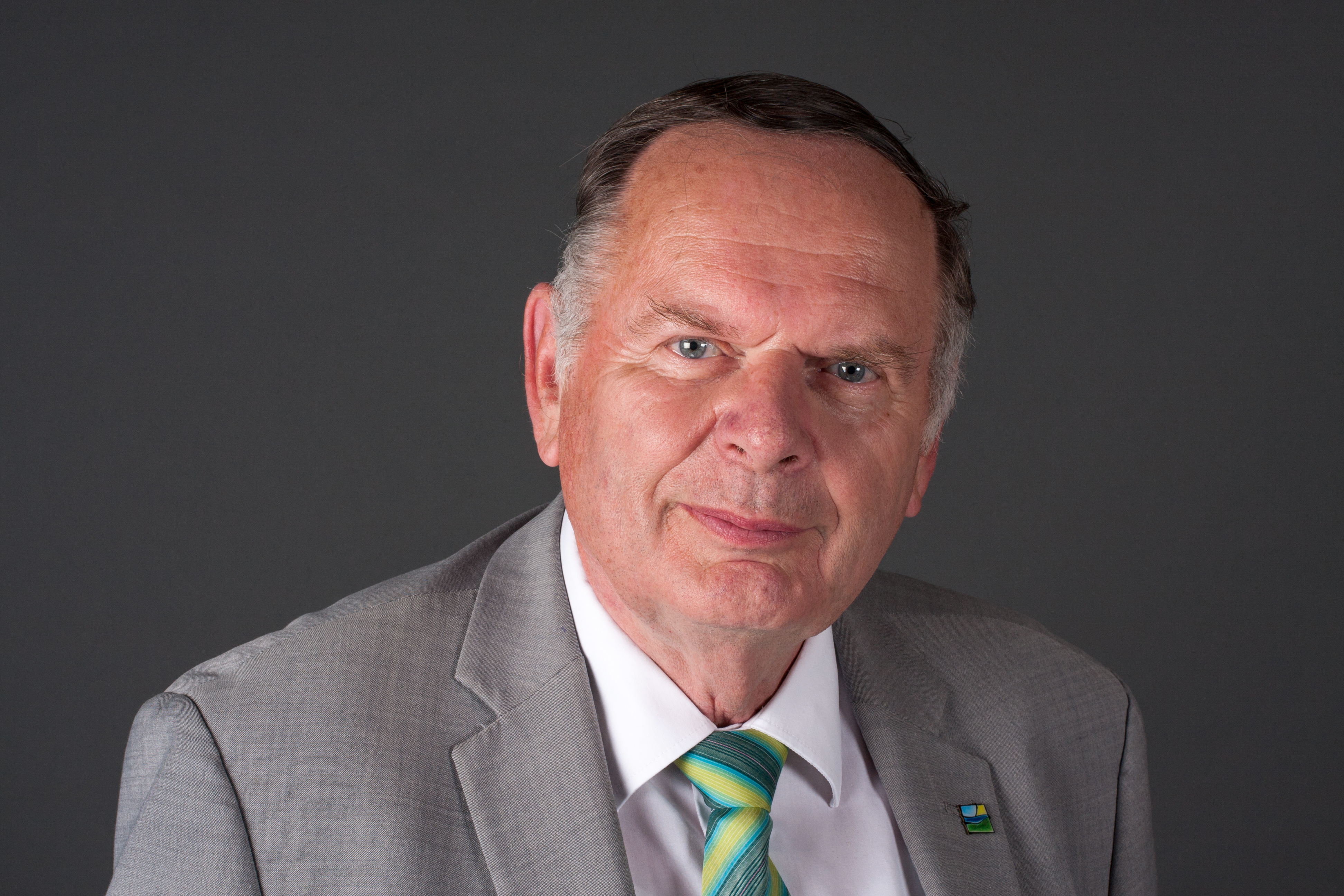 Fritz Tack, MdL Mecklenburg-Vorpommern, Fraktion die Linke